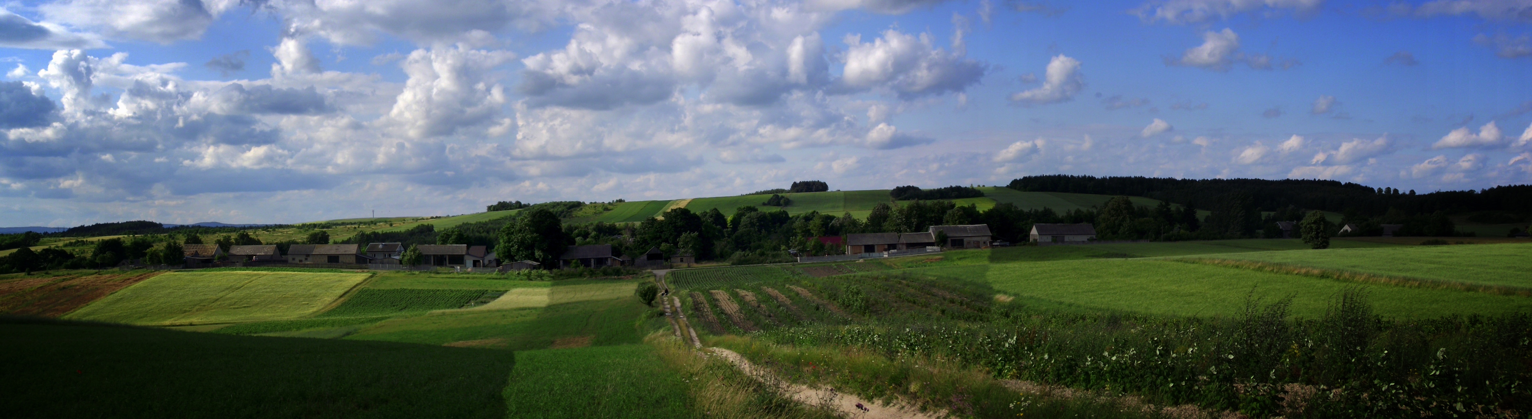 Jasień